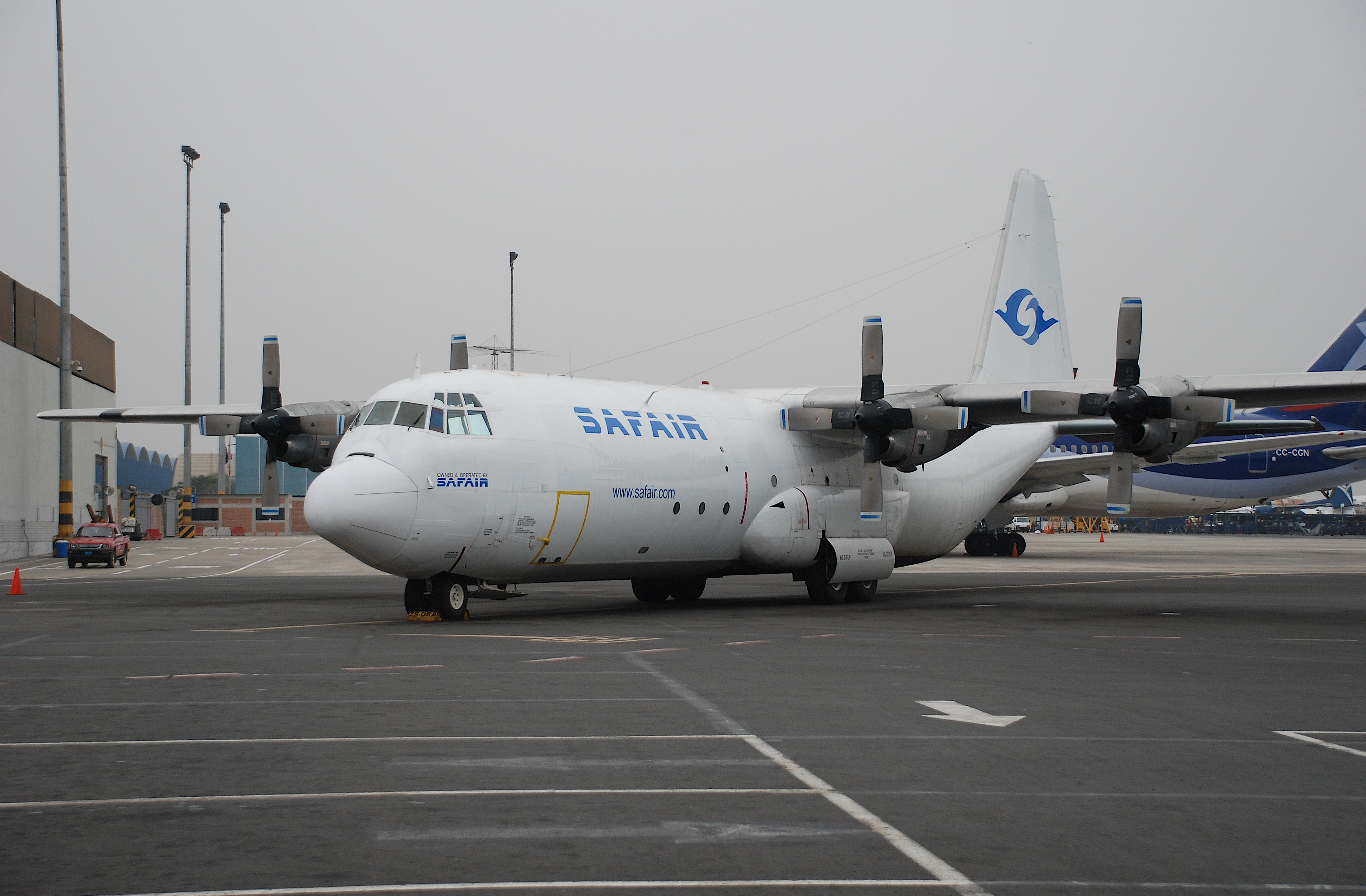 ZS-ORA@LIM;30.06.2008/519ai